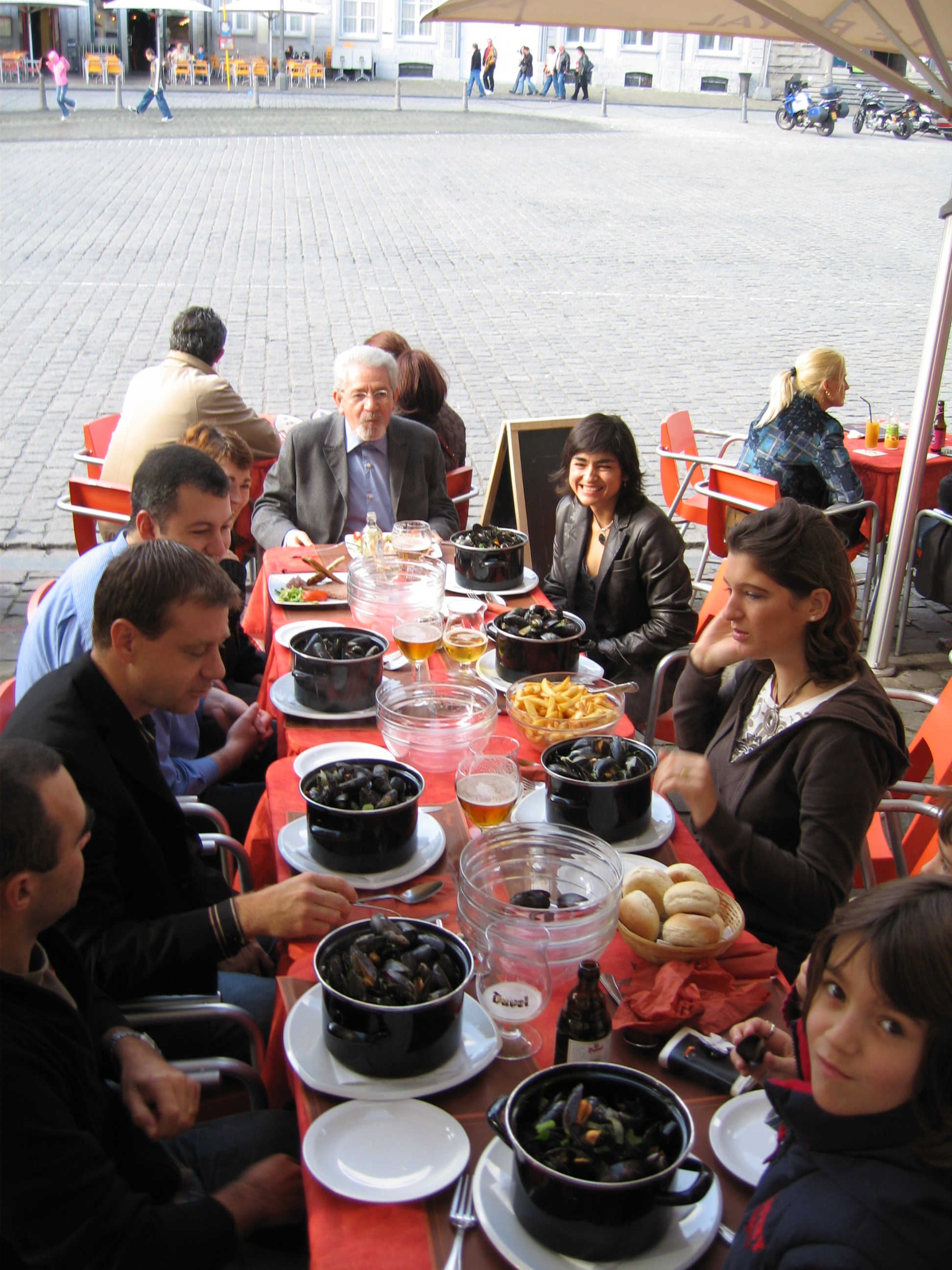 Belgica, oct. 2006Moules et Frites